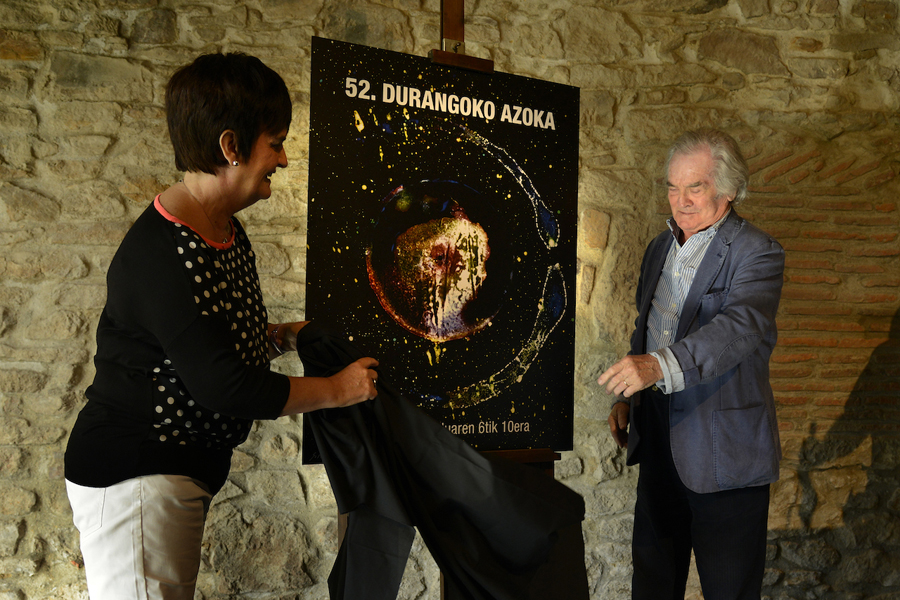 Nerea Mujika eta Jose Antonio Sistiaga Durangoko azokaren 2017ko kartelaren aurkezpenean.